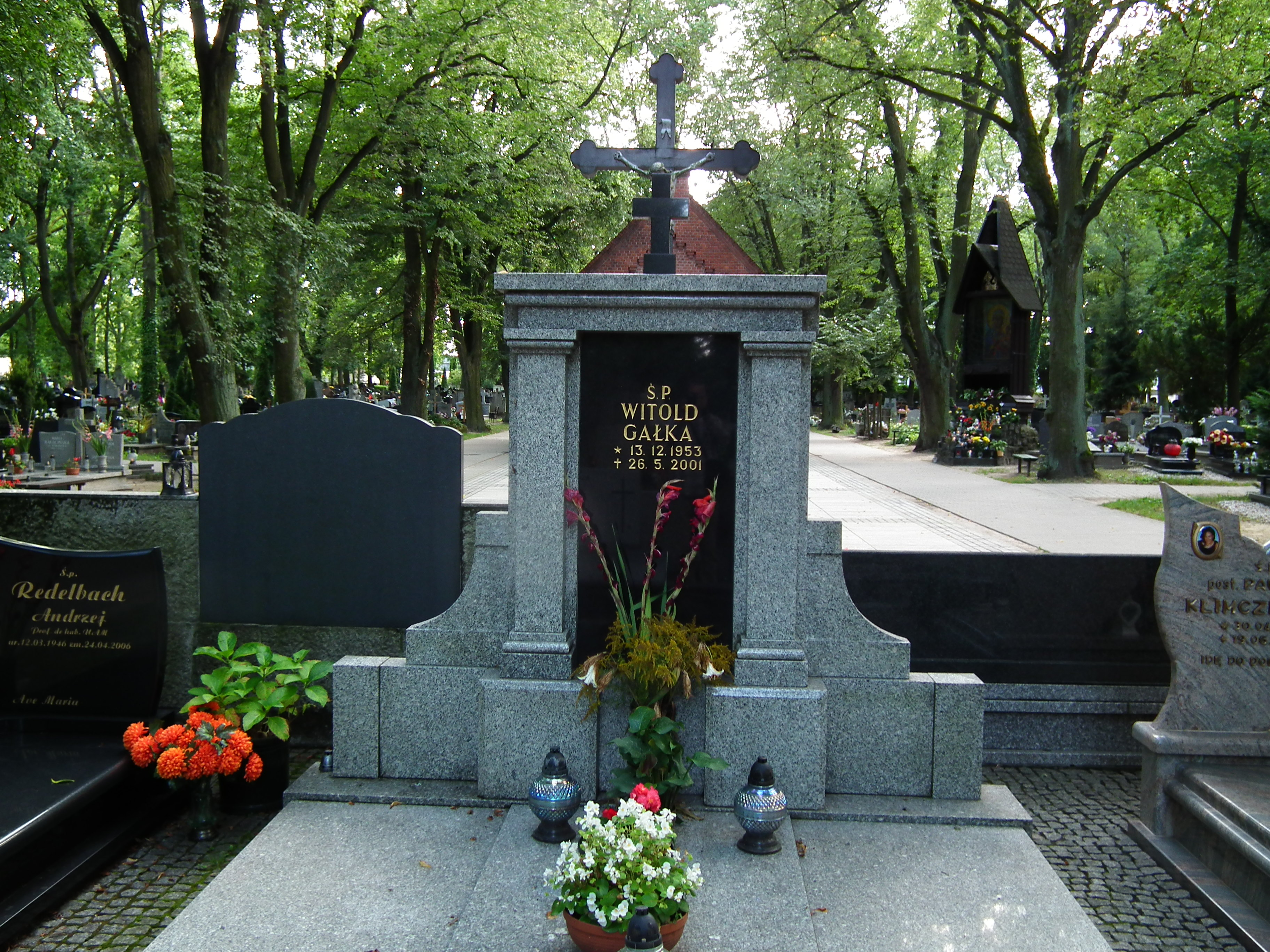 Cm. jeżycki w Poznaniu - grób Witolda Gałki.